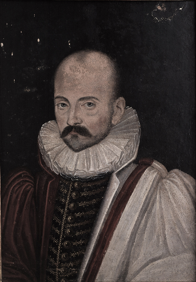 Montaigne vers 1580, portrait anonyme ayant appartenu au comte de Kercado, dont l'épouse - née de Lévis-Mirepoix - descend d'un parent de Montaigne.